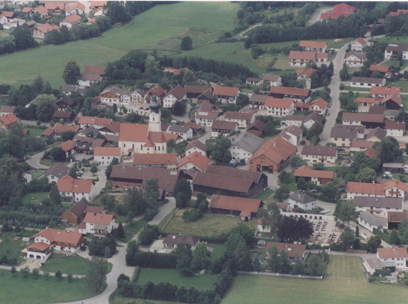 Dorfansicht